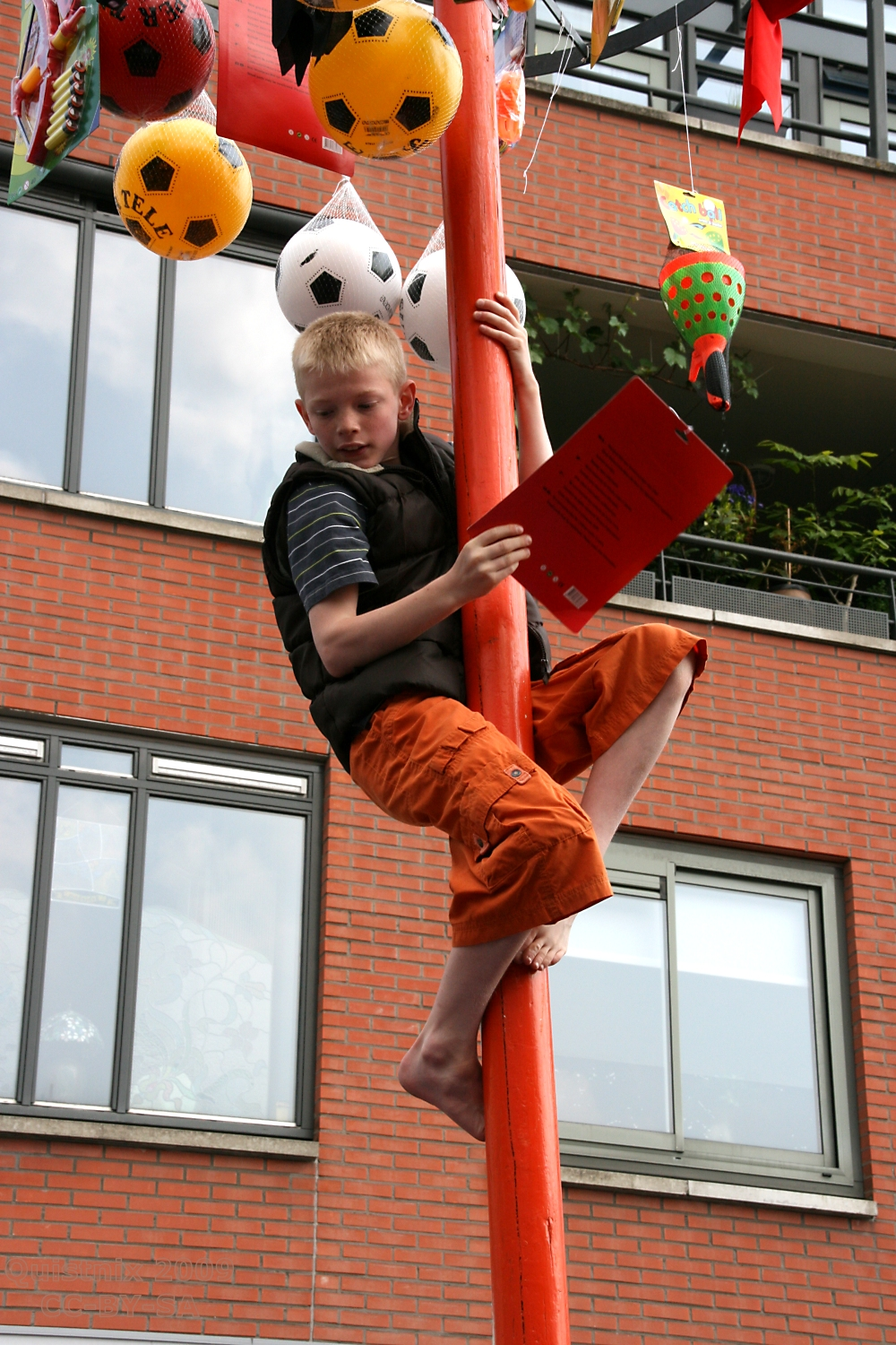 Vlaardingen - Mastklimmen tijdens Koninginnedag 2009